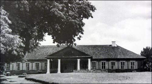 Маєток ширми у селі Спорів, що існував до 1939 року.